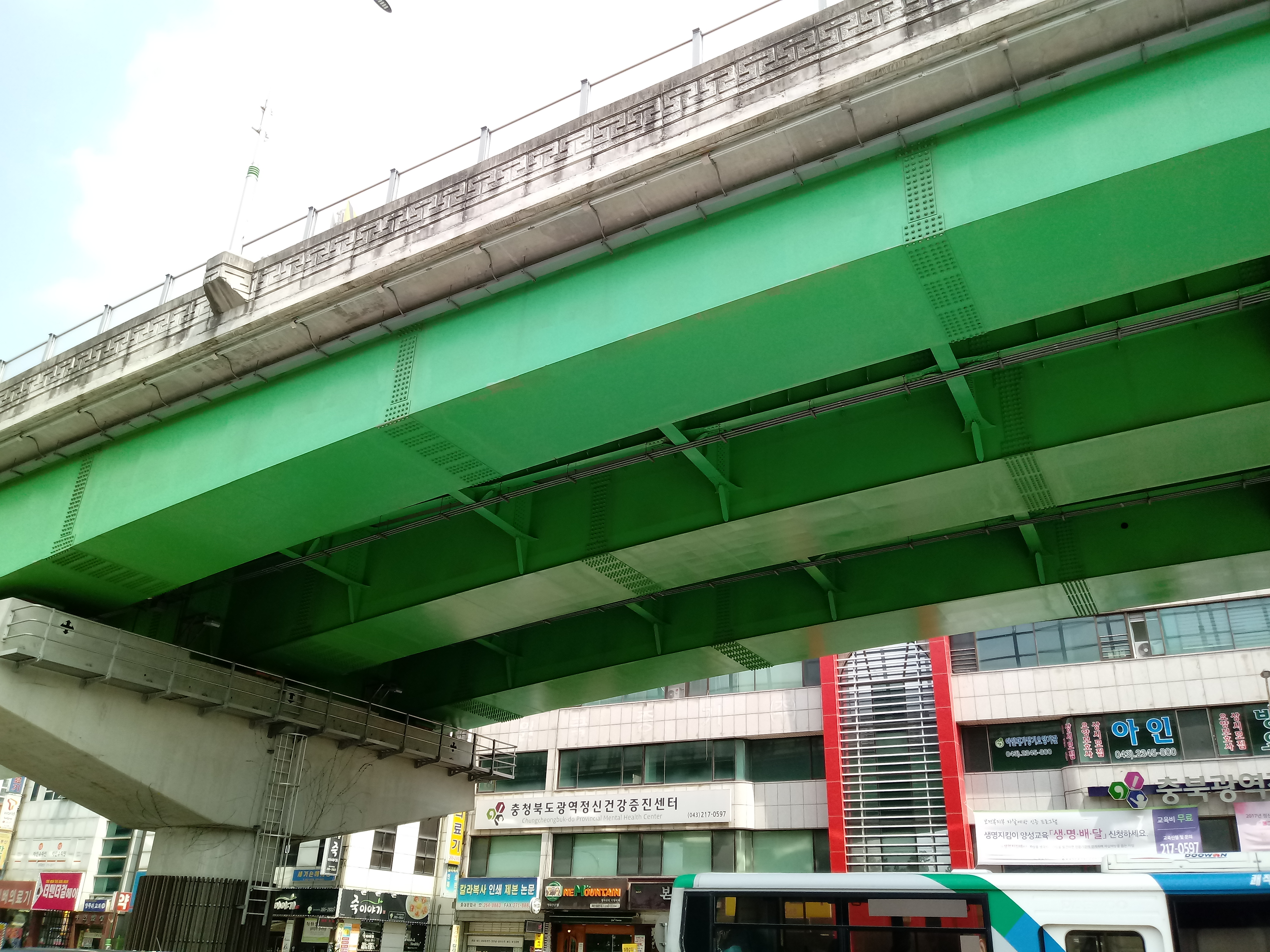 개신오거리 고가차도